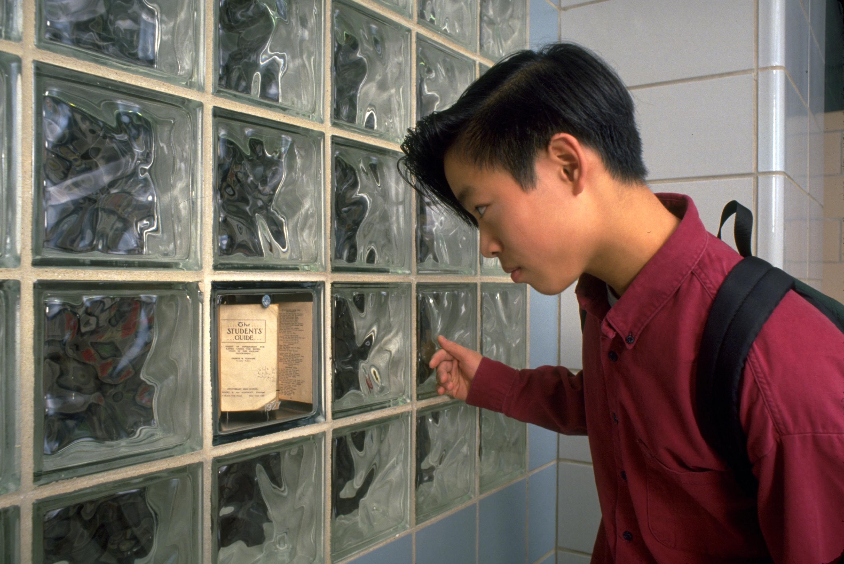 Mnemonics, 1992 (Kristin Jones / Andrew Ginzel)